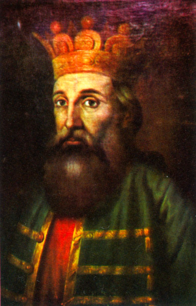 Petru I Muşat